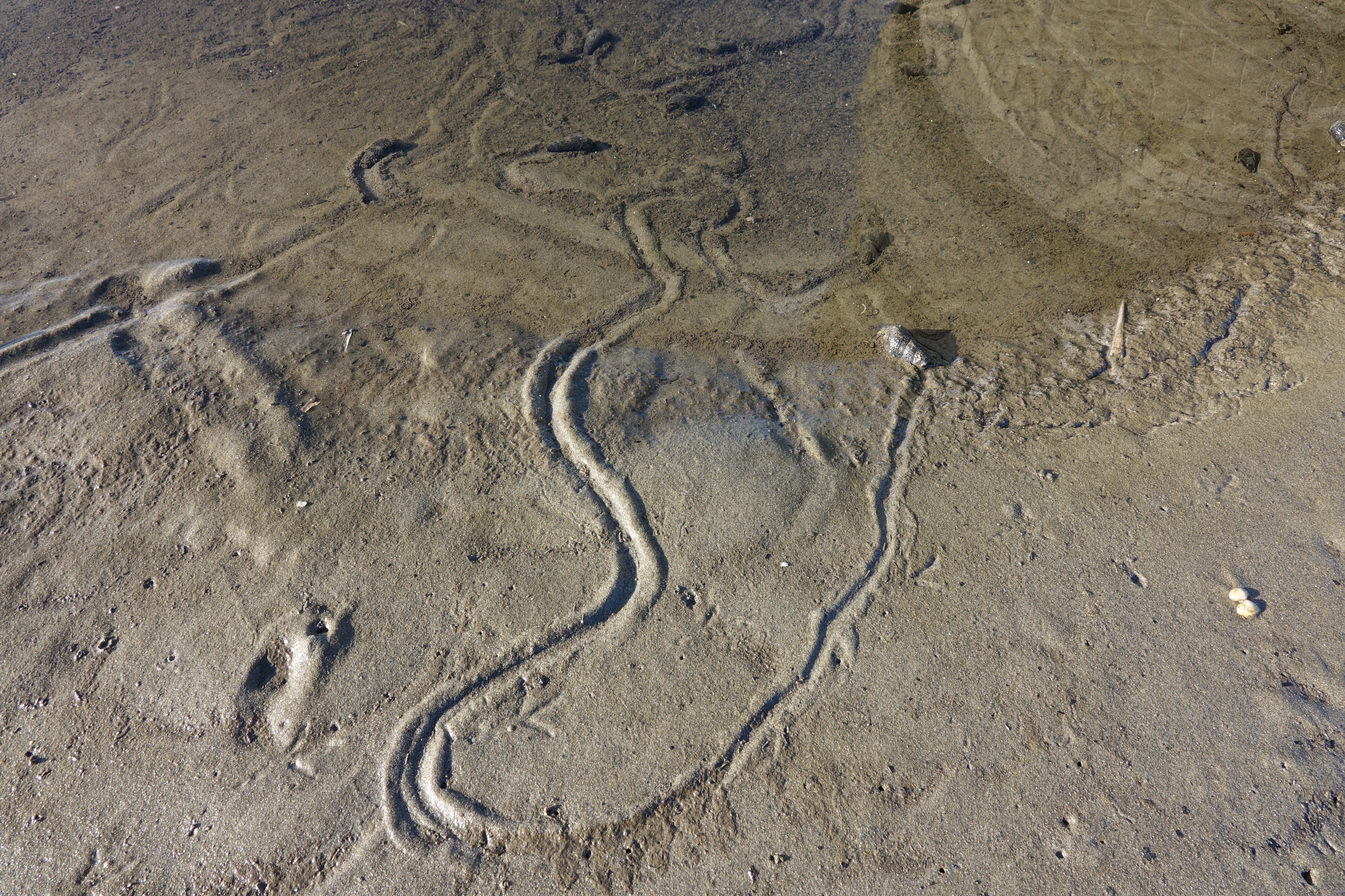 チリメンカワニナの這いずり痕 日本、東海地方